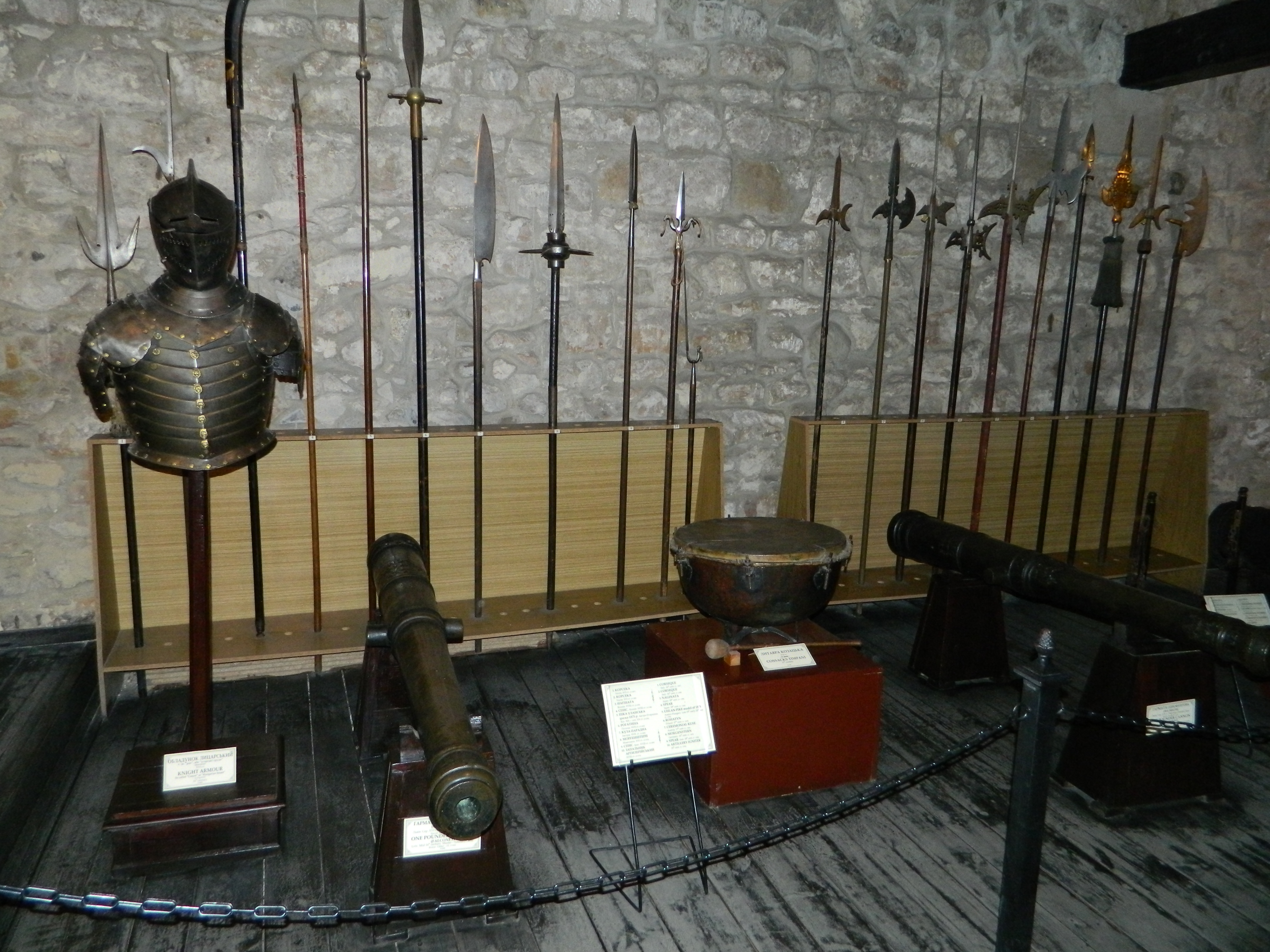 Средневековое оружие в городском арсенале